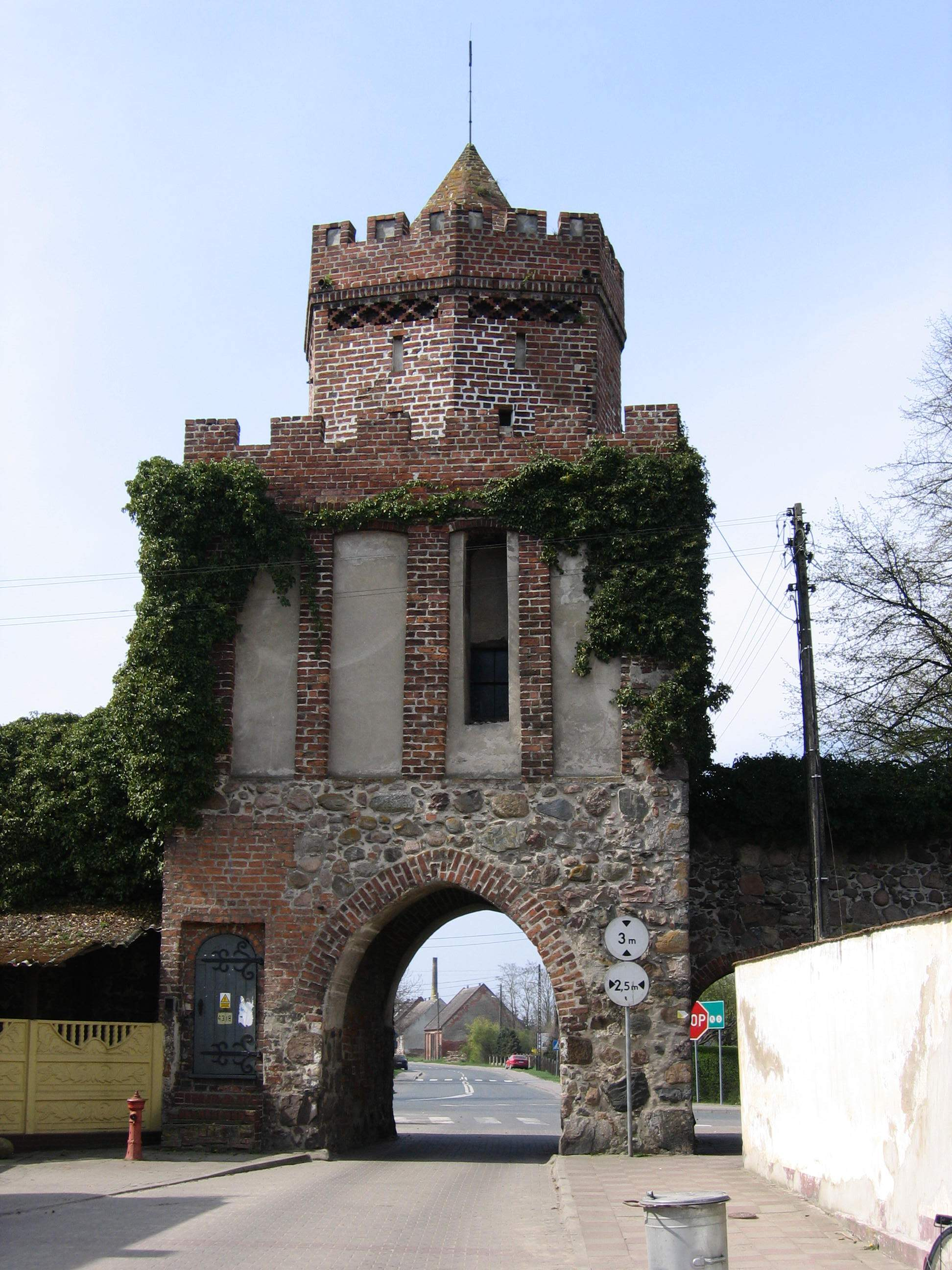 Trzcińsko-Zdrój - Brama Chojeńska w zespole obwarowań miejskich